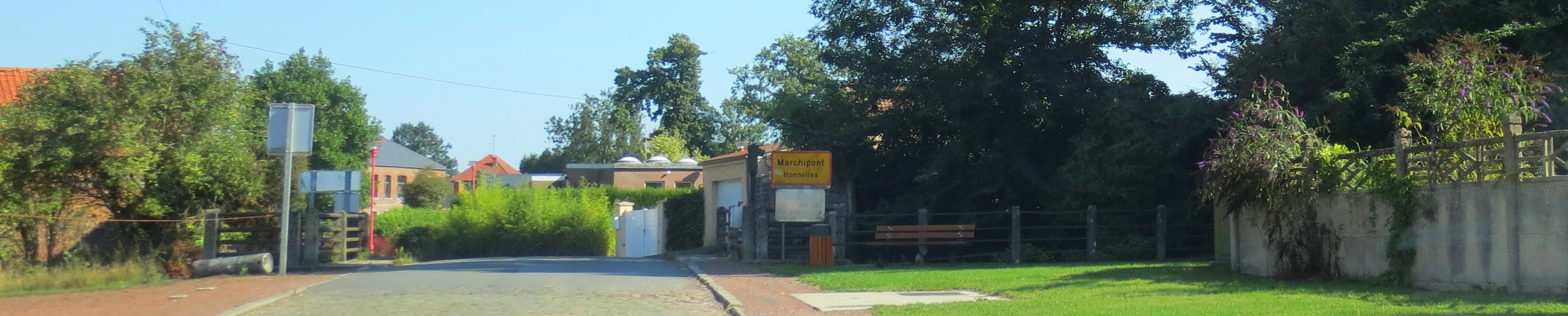 Vue panoramique de Marchipont